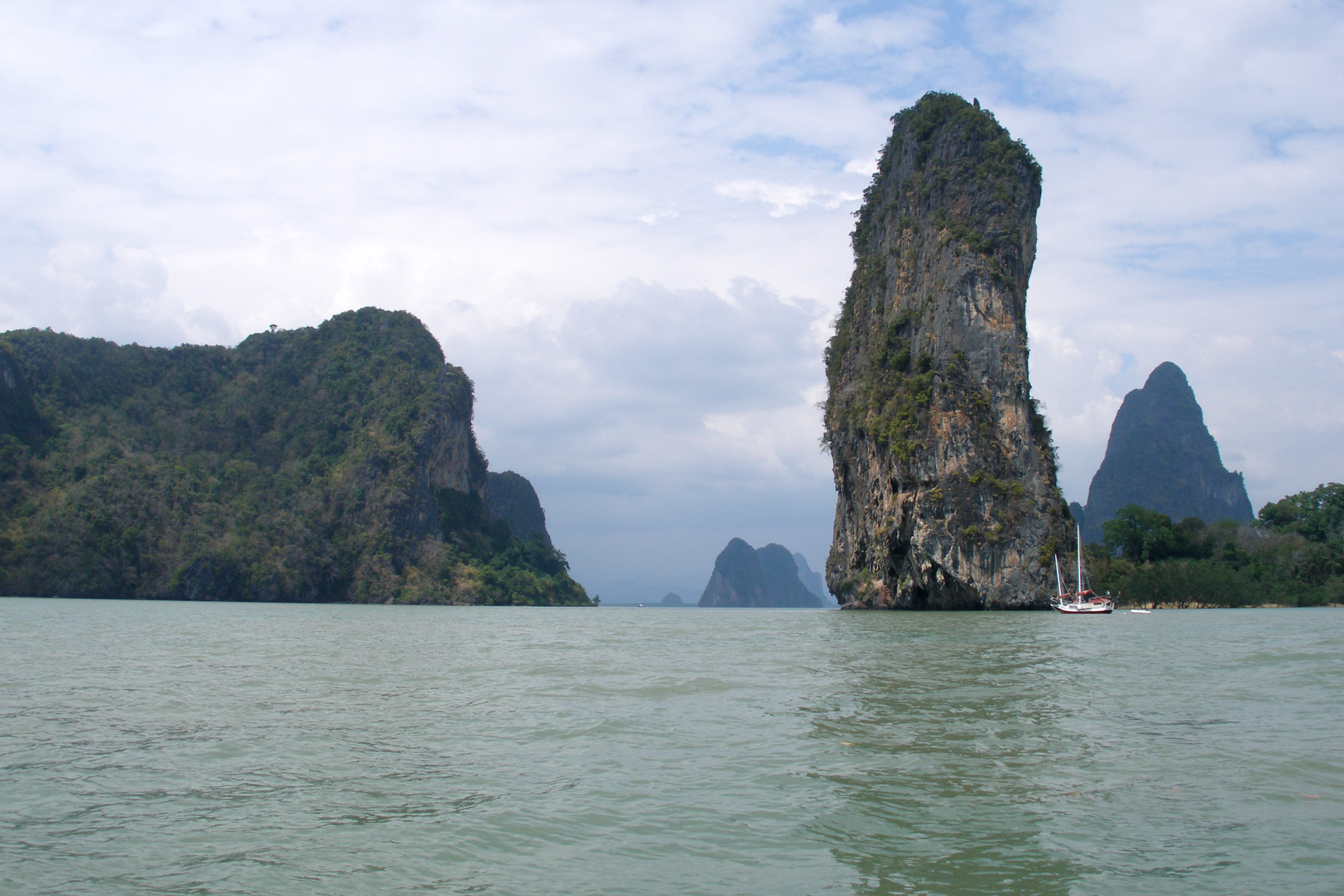 อุทยานแห่งชาติอ่าวพังงา